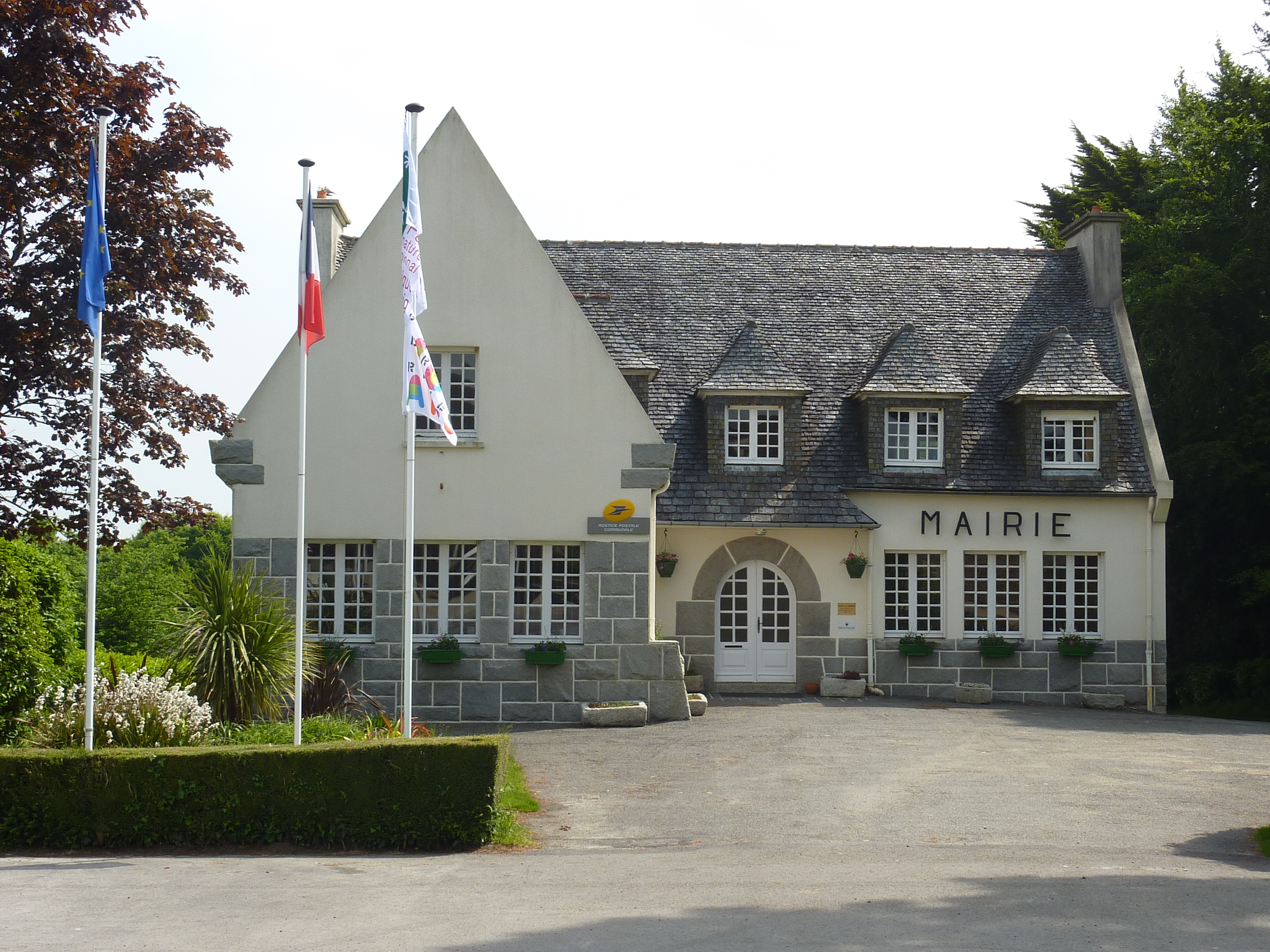 Commana La mairie et poste